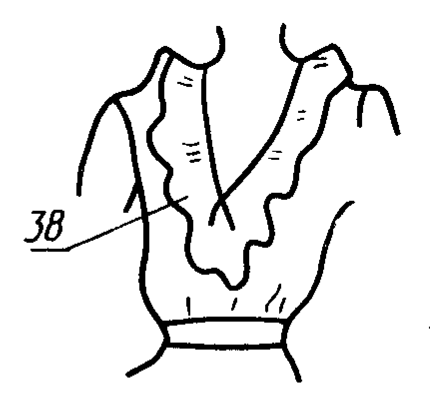 Изображение из ГОСТ 22977-89 (СТ СЭВ 6484-88) — Детали швейных изделий. Термины и определения.